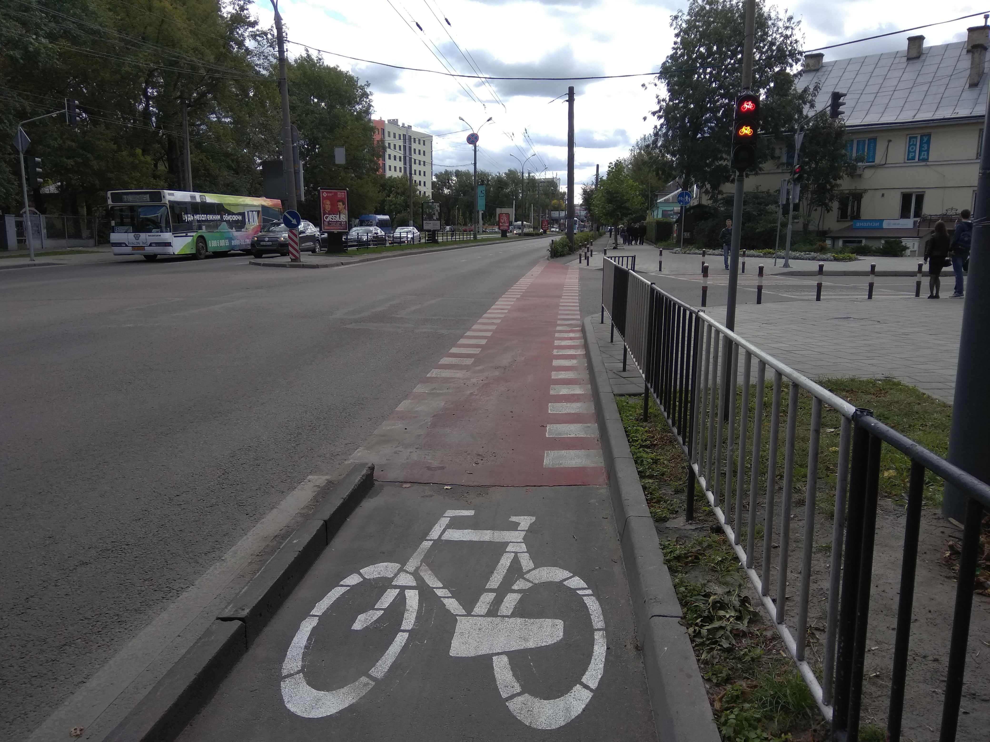 Велодоріжка на пр. Чорновола у Львові